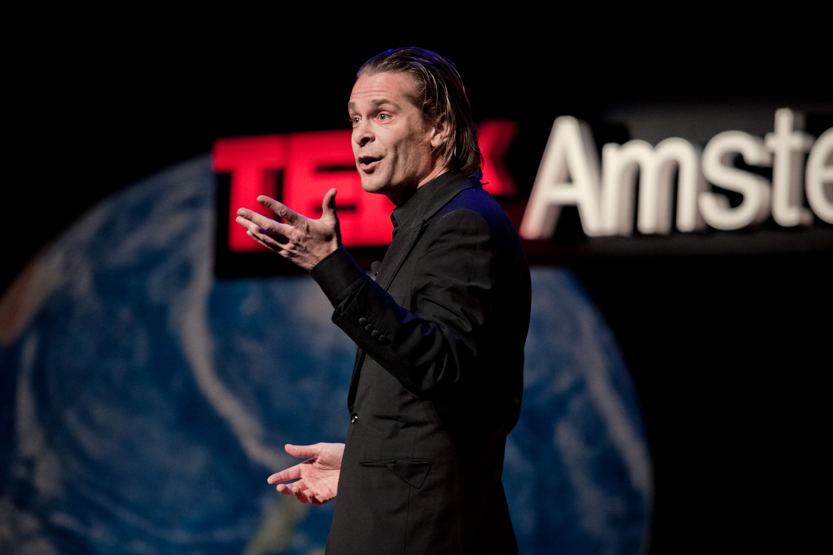 Hans Teeuwen performing at TEDxAmsterdam 2010